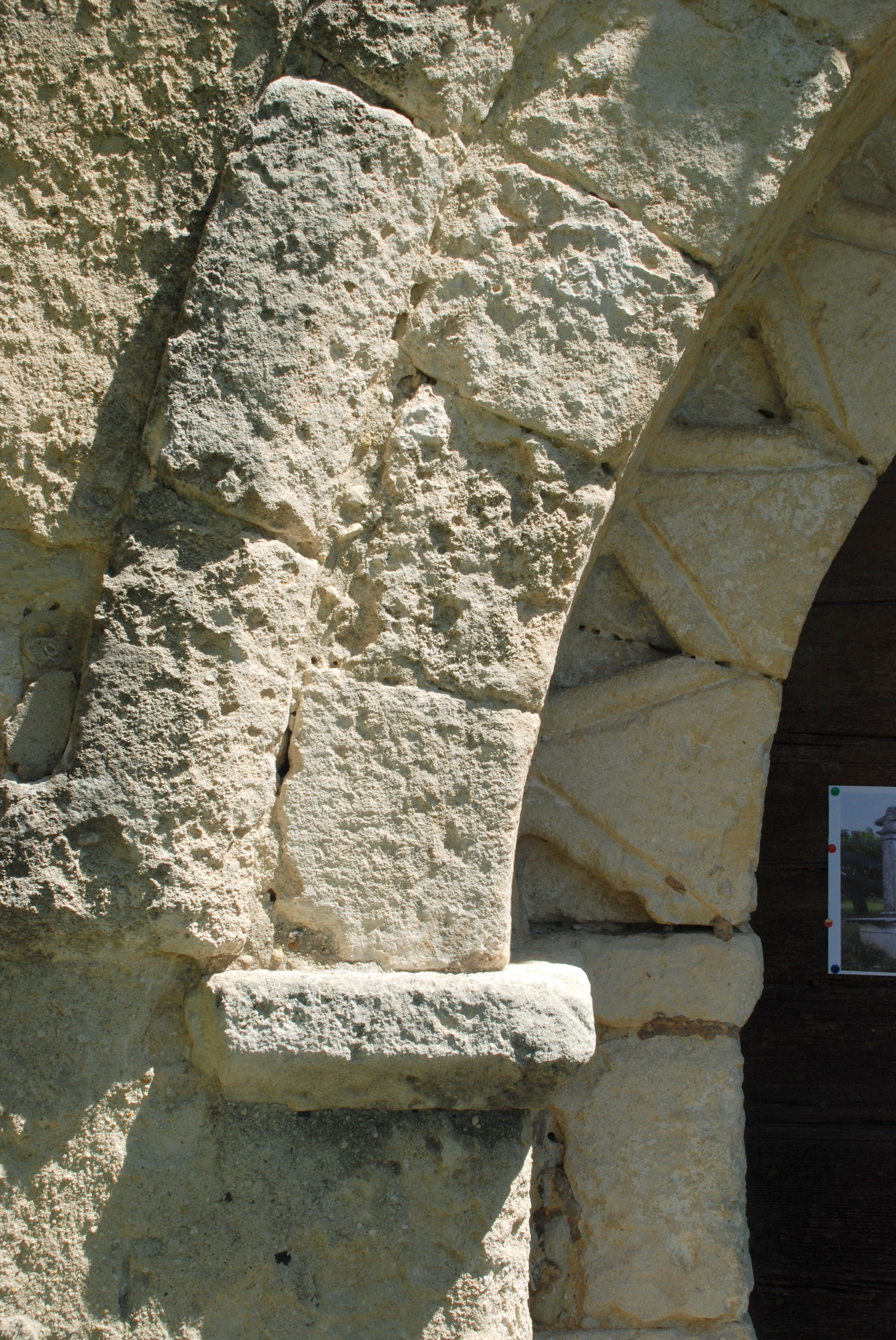 France - Drôme - Chapelle des Barquets